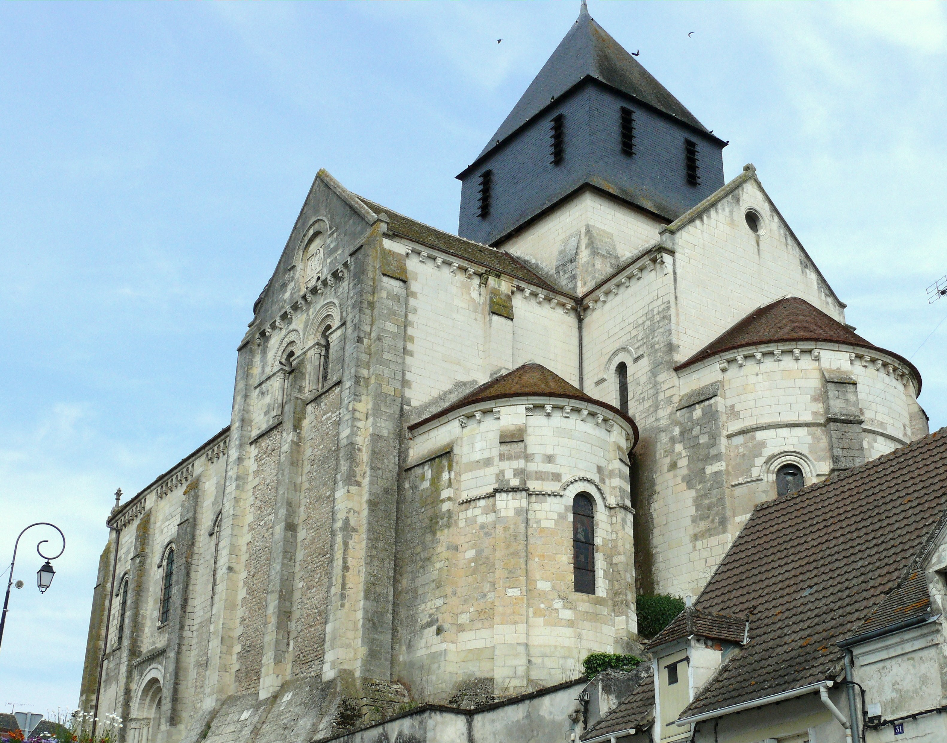 Châtillon-sur-Indre - Eglise Notre-Dame - Chevet